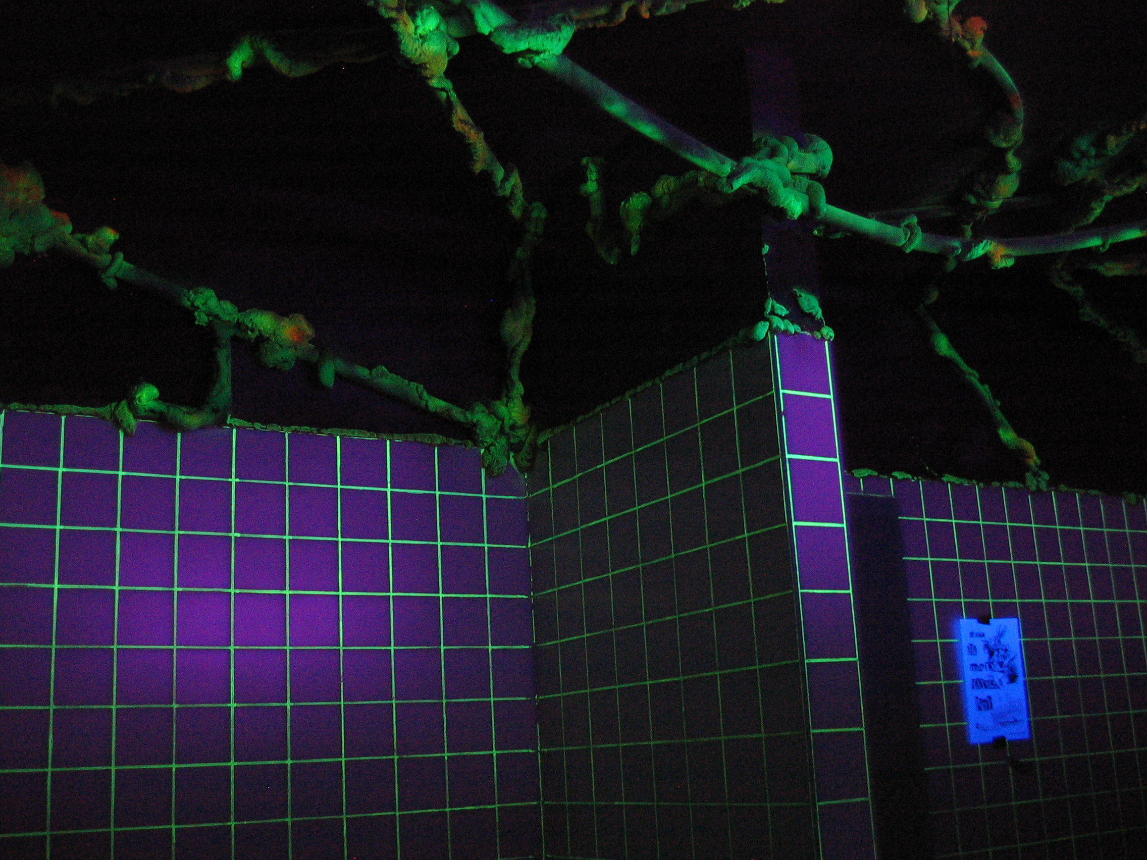 spectáculo en la c-base